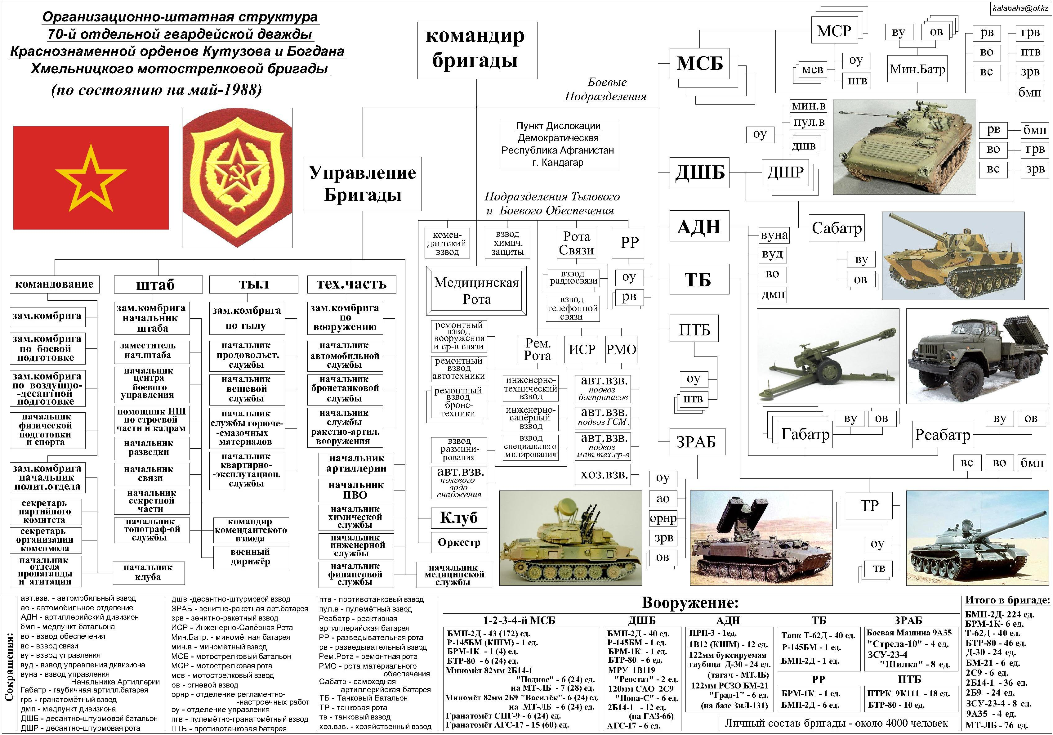 Организационно-штатная структура 70-й гв.омсбр на май-1988. Собственная работа на основе данных, взятых у Бешкарева Александра Ивановича в статье "Афганистан. 70 гв.омсбр" на сайте , и данных, взятых на сайте 70-й гв.омсбр - . Отчерчено в AutoCAD 2005